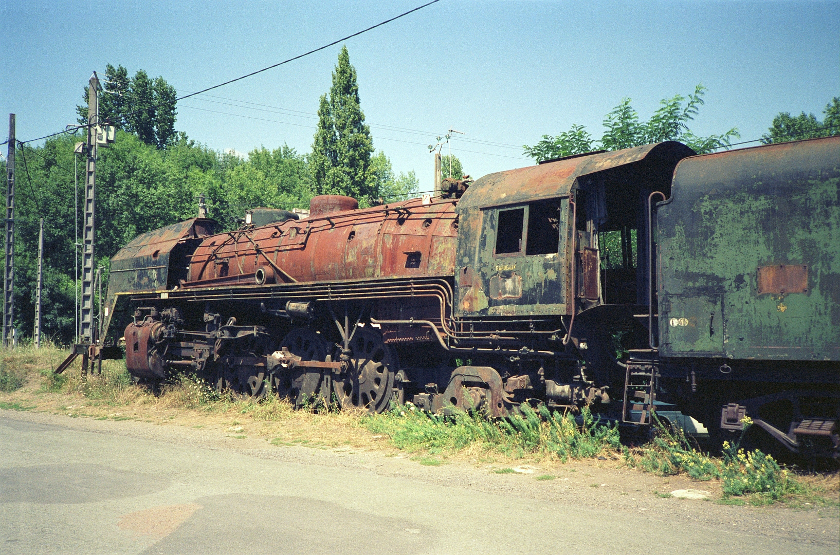 La 141 R 1332 garée à Jarnac (Charente) le 18 août 1991.